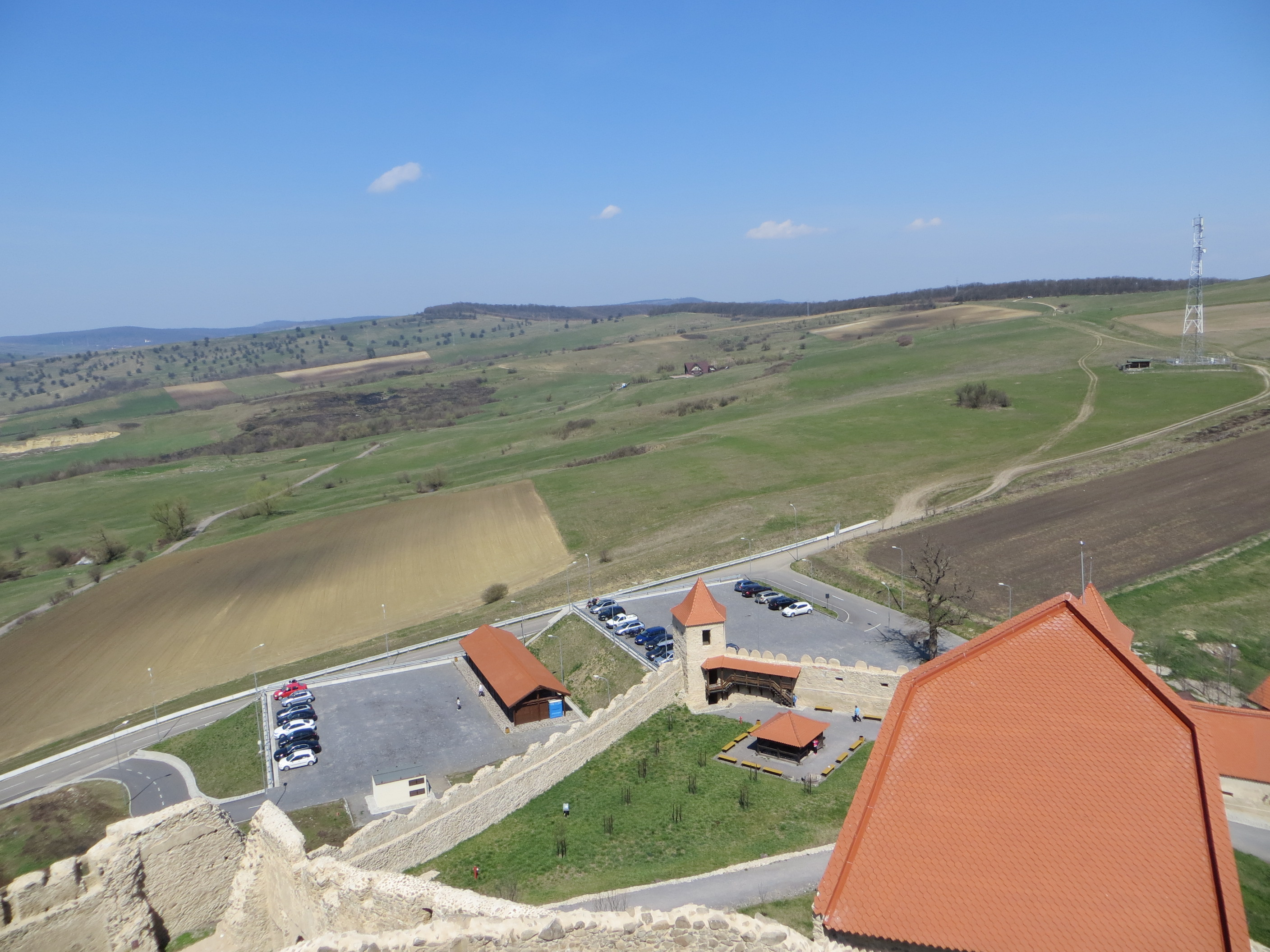 Incinta inferioară a Cetății Rupea, cu turnuri, turn de poartă, fântână, anexe 03